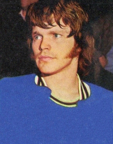 SPORT VEDETTES-PANINI 1974-Figurina n.50- KENNEY - USA -PALLACANESTRO-Rec